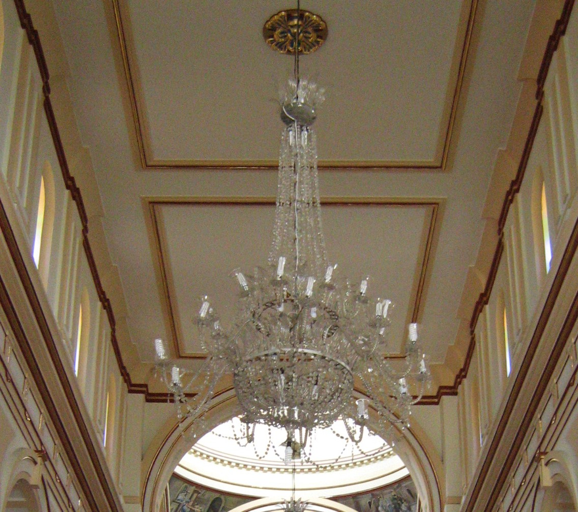 Lamparas de la Basílica de Yarumal, Antioquia, Colombia.